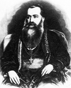 Andrei Şaguna